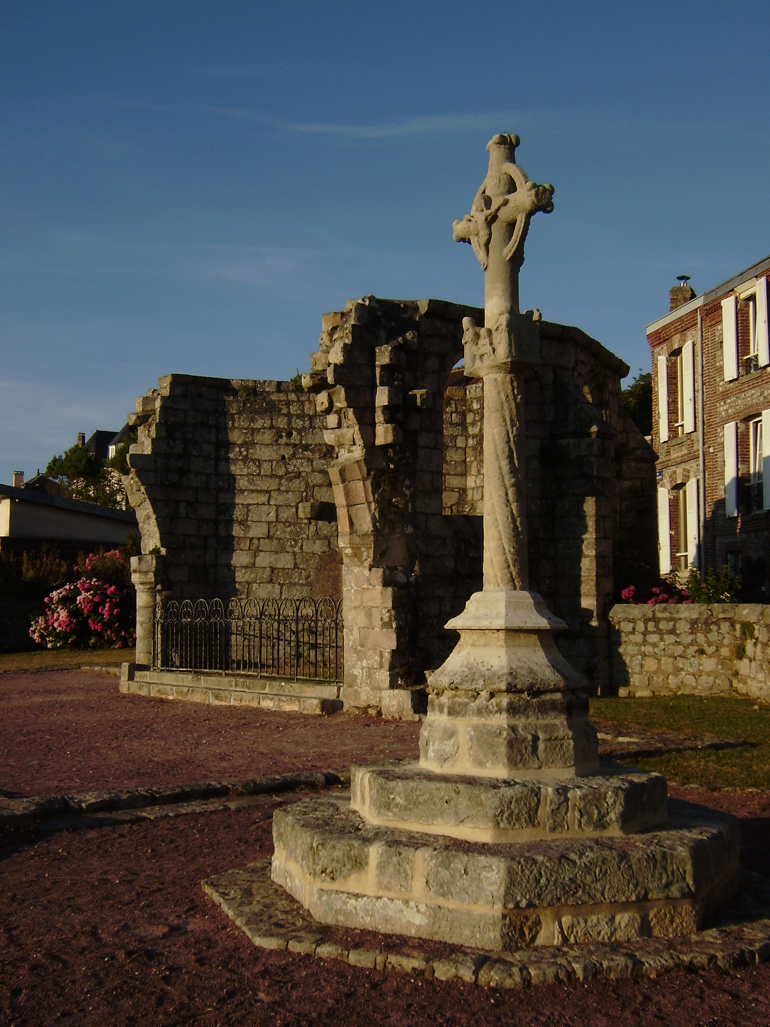 Ruines de l'église Saint-Nicolas à Veules-les-Roses et la croix hosannière du cimetière. Rue Paul Meurice.